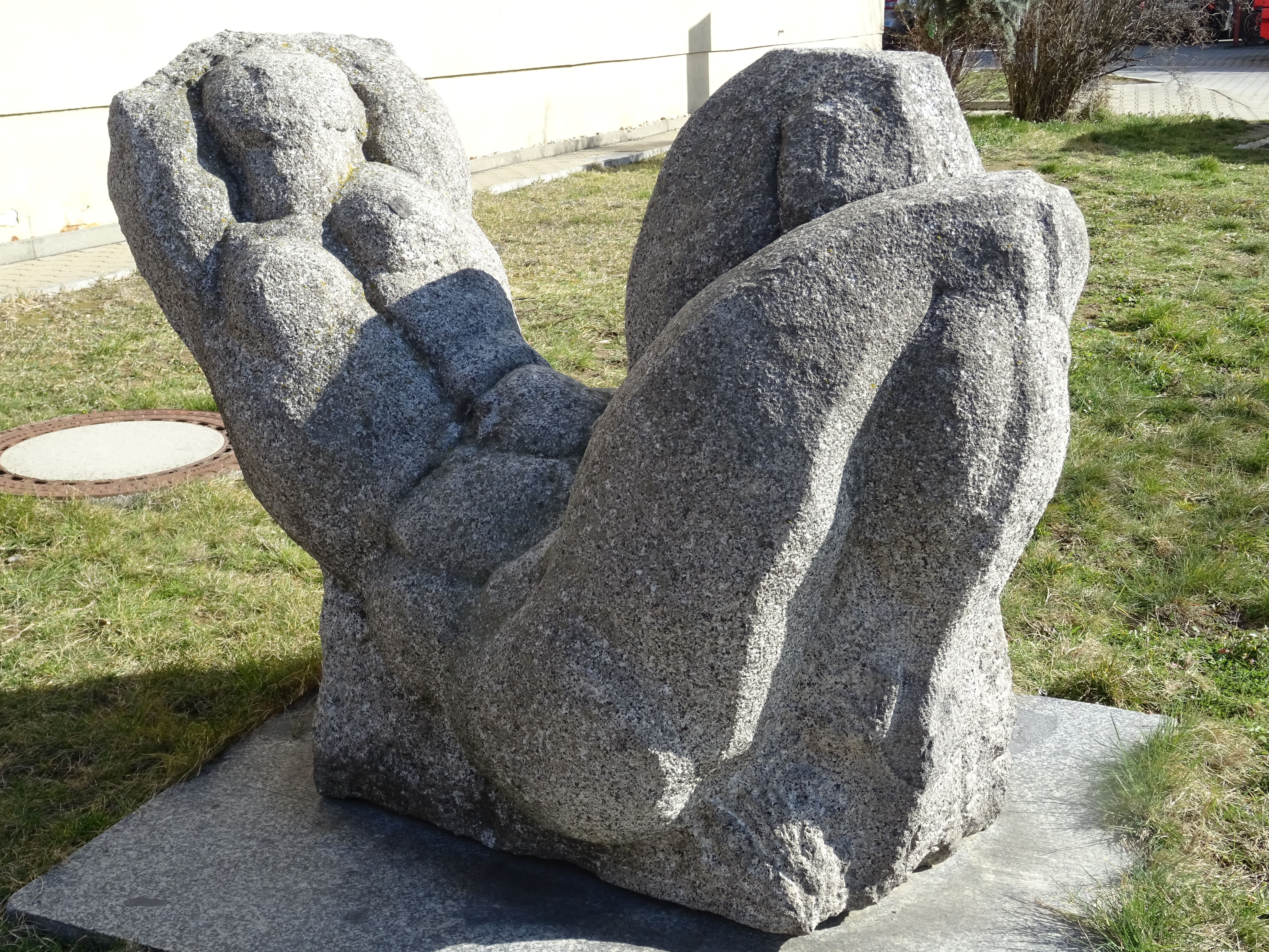 Bautzen: Skulptur "Liegender Frauenakt" vom Bildhauer Miroslav Klimes, Standort Töpferstraße 17